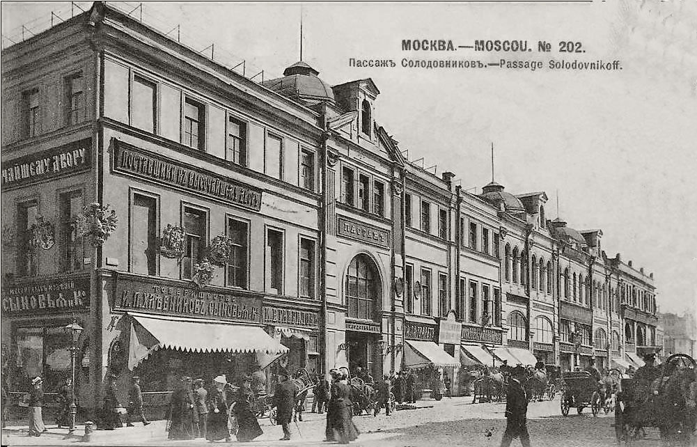 Солодовниковский пассаж на Кузнецком Мосту в Москве